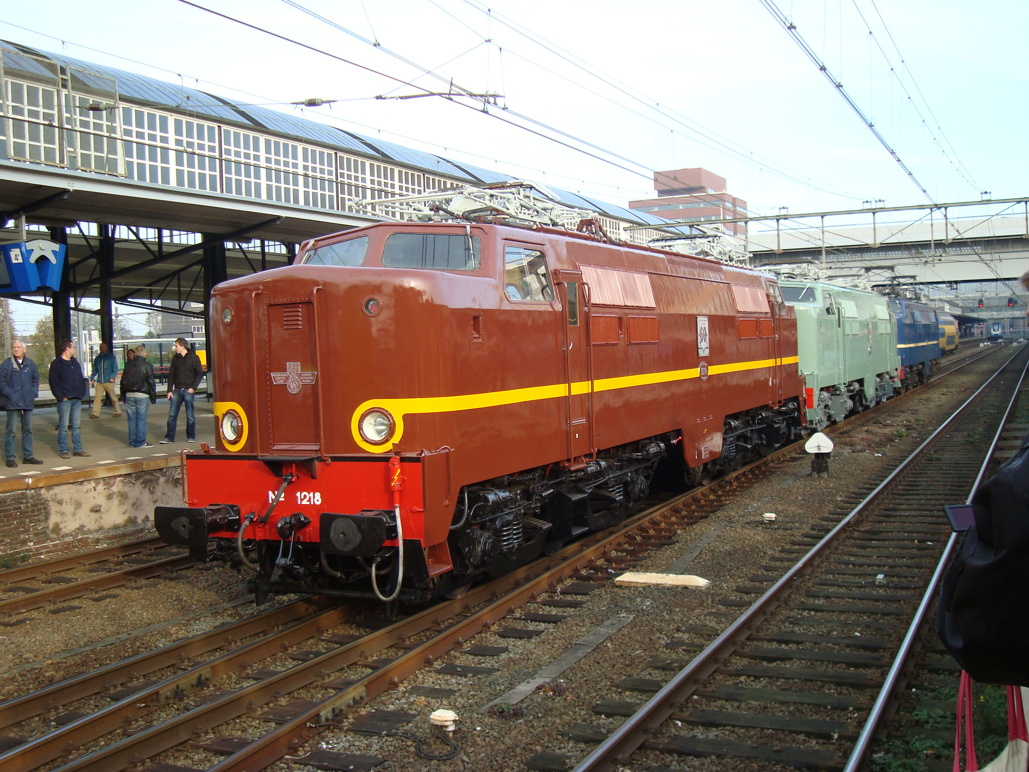 Bij de reünie van diverse locomotieven van de serie NS 1200 was ook deze aanwezig, overgeschilderd in het rood-bruin van de jaren vijftig.